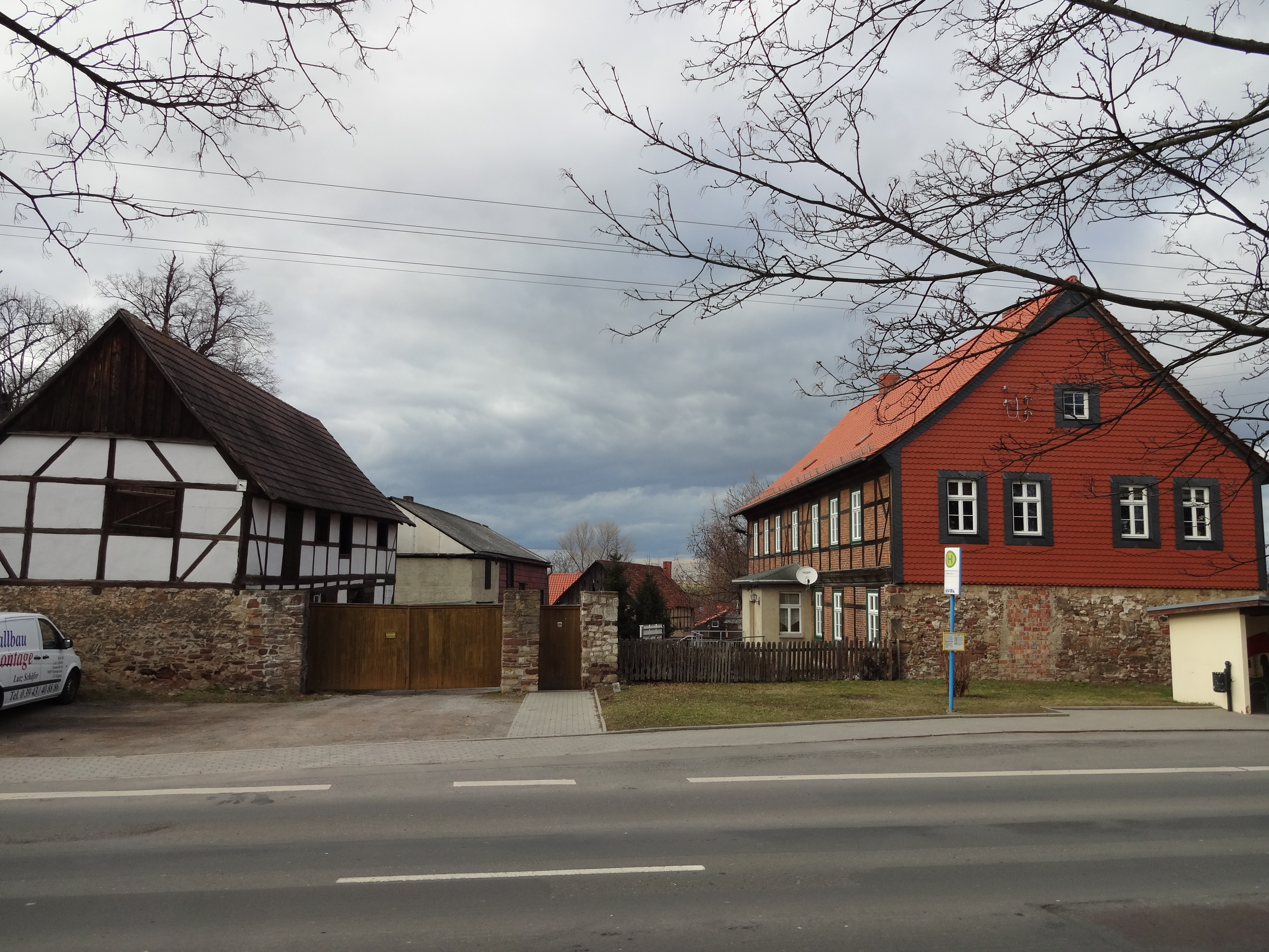 Pfarrhaus in der Harzstraße 38, Kulturdenkmal in Silstedt, Ortsteil von Wernigerode